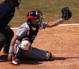 Akihiro Yano